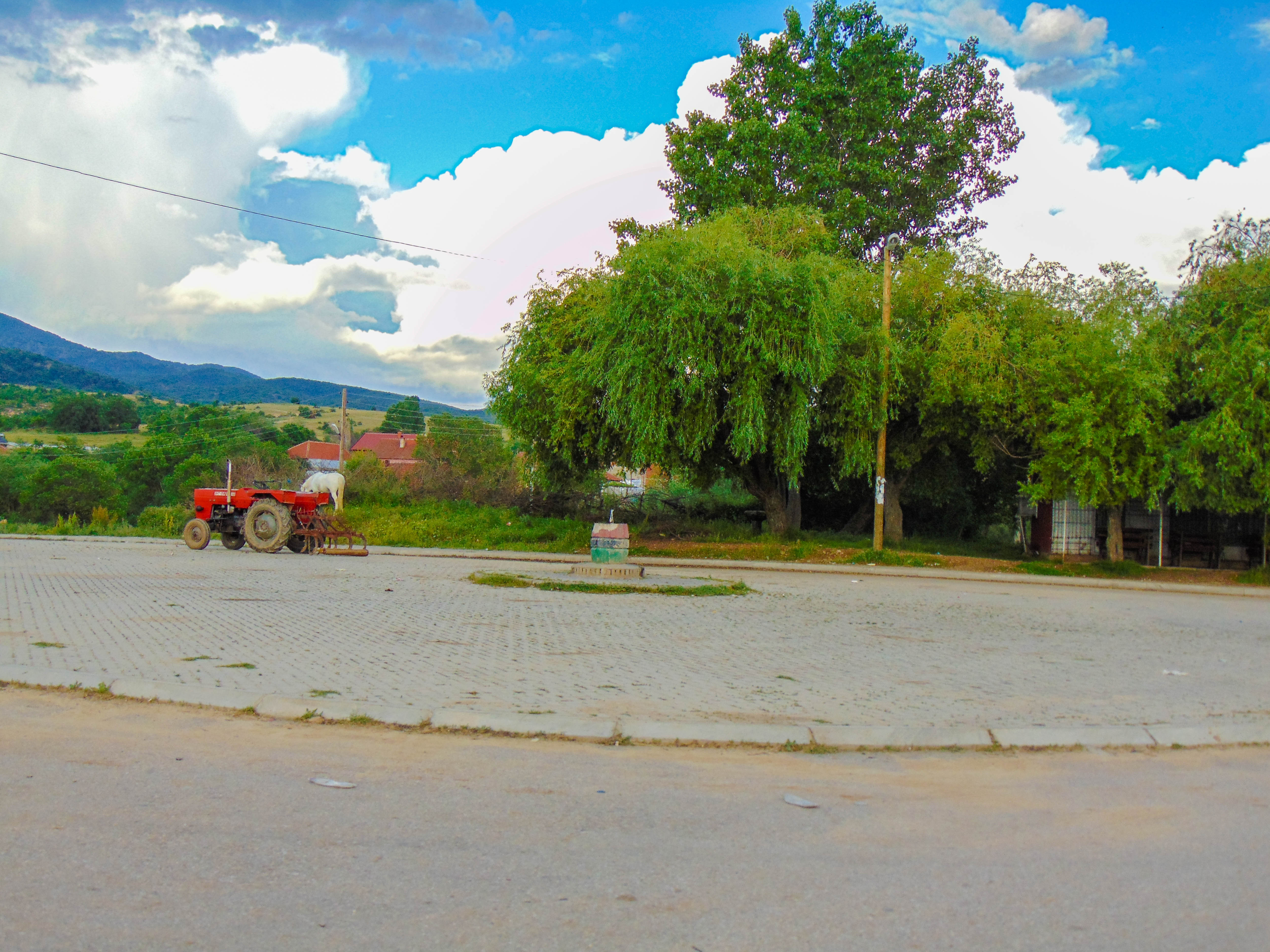 Јаргулица, Општина Радовиш